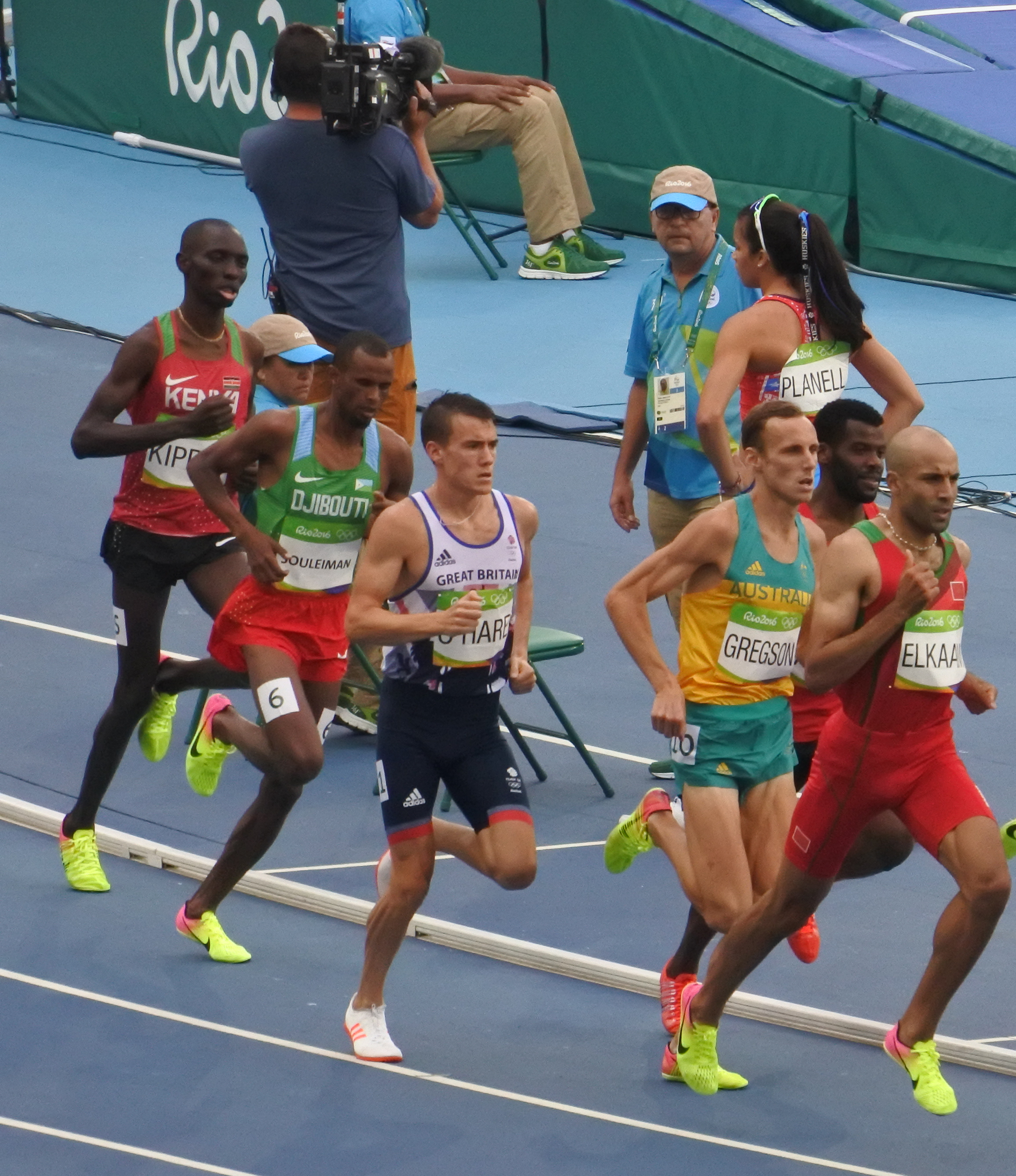 Rio 2016 - Eliminatórias 1500m Masculino